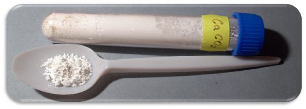 Uhličitan vápenatý - CaCO3